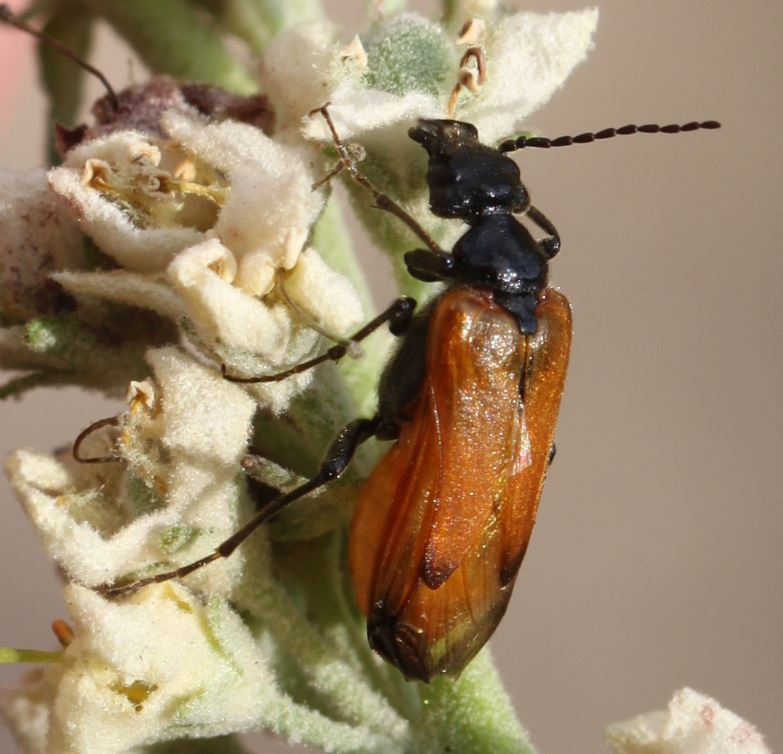 Seidenbienen-Ölkäfer (Stenoria analis) an einer Königskerze am 10. August 2018 in der Schwetzinger Hardt